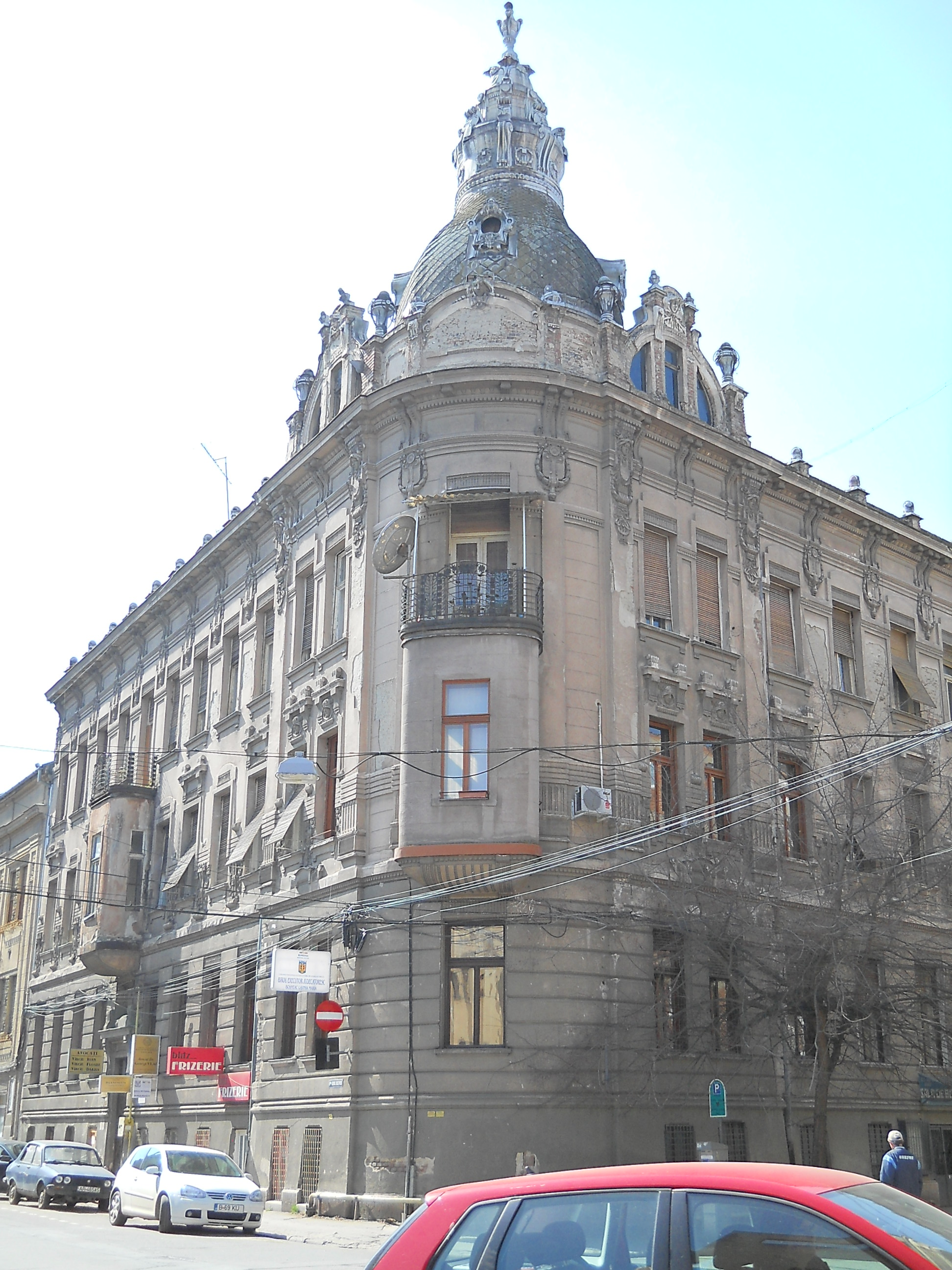 Palatul Kovács, vedere de ansamblu